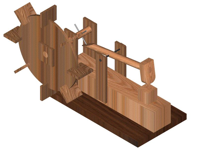 Imatge 3D de la maqueta d'un martinet de farga catalana.